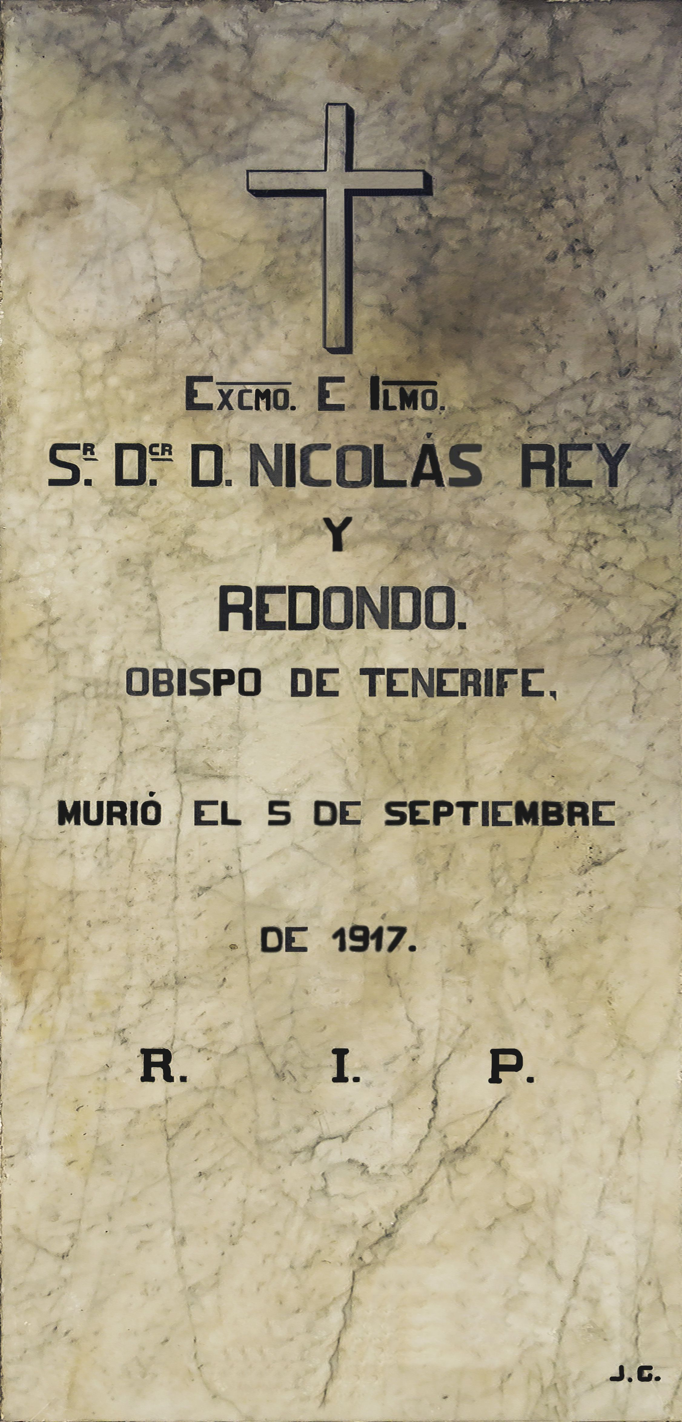 Grabplatte des Bischofs Nicolás Rey Redondo